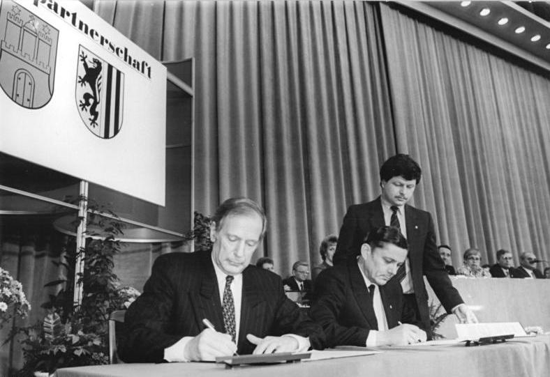 ADN-ZB-Häßler-21.1.88-Dresden: Städtepartnerschaft- 14.12.87 unterzeichneten der Dresdner Oberbürgermeister, Wolfgang Berghofer (r.), und der Präsident des Amtsrates und 1. Bürgermeister der Hansestadt Hamburg, Klaus von Dohnanyi (l.), die Vereinbarung zur Entwicklung kommunaler Beziehungen im Plenarsaal des Rathauses.